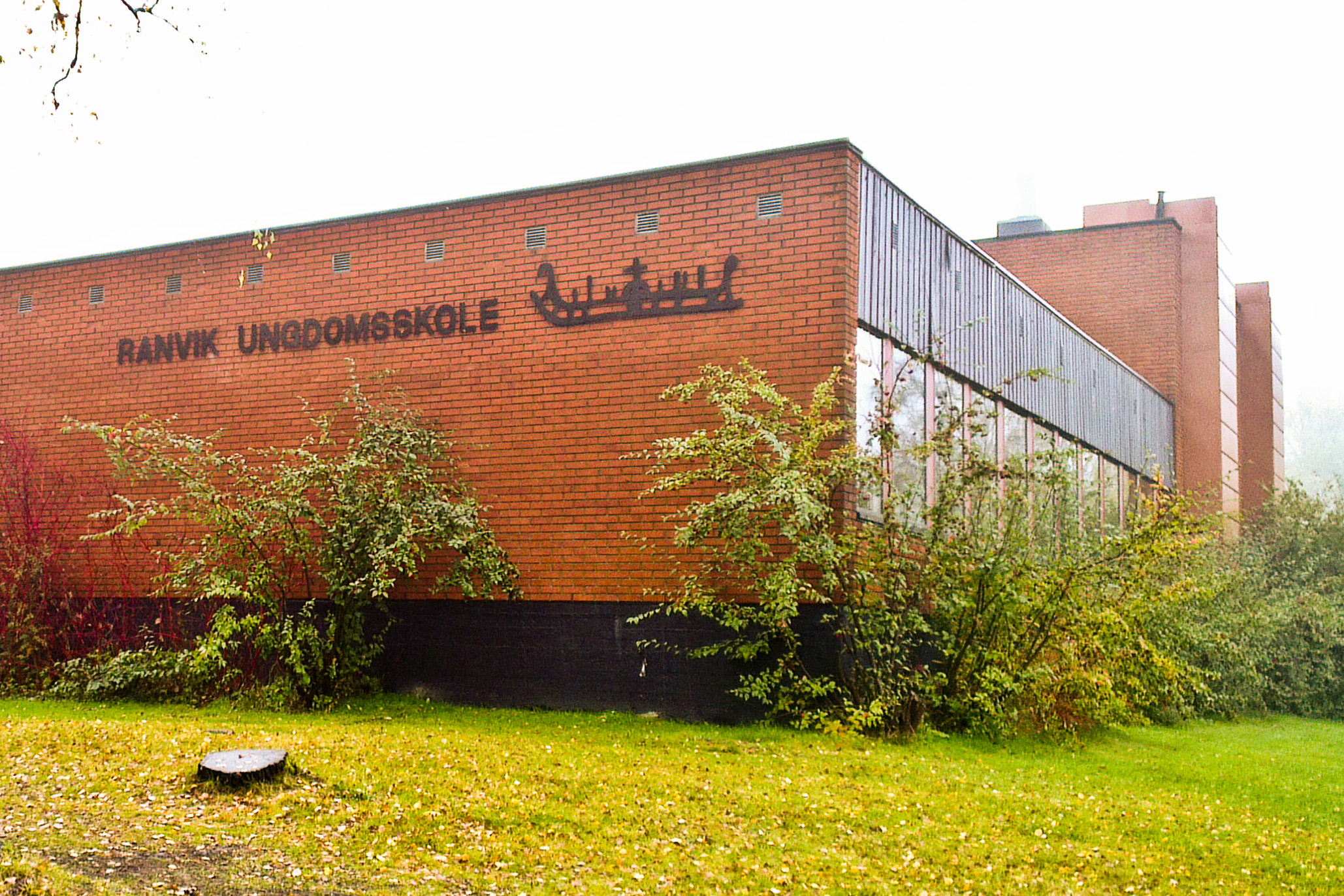 Ranvik Ungdomsskole i Sandefjord